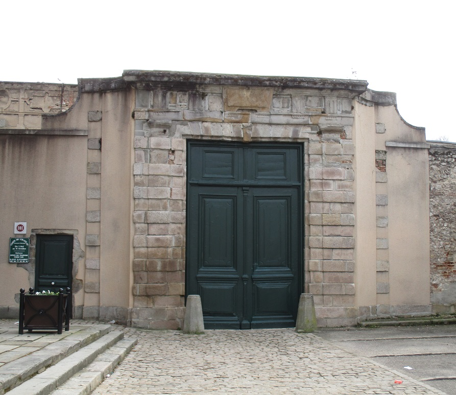 Portail d'entrée du château de Sury le Comtal au bout de la rue Jordan de Sury, devant le parvis de l'église qui est à gauche. S